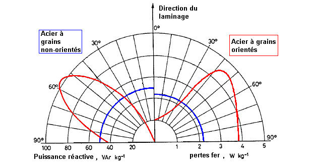 Diagramme représentant les pertes d'un fer doux à grains orientés comparées à celles d'un fer doux à grains non-orientés en fonction de l'angle.